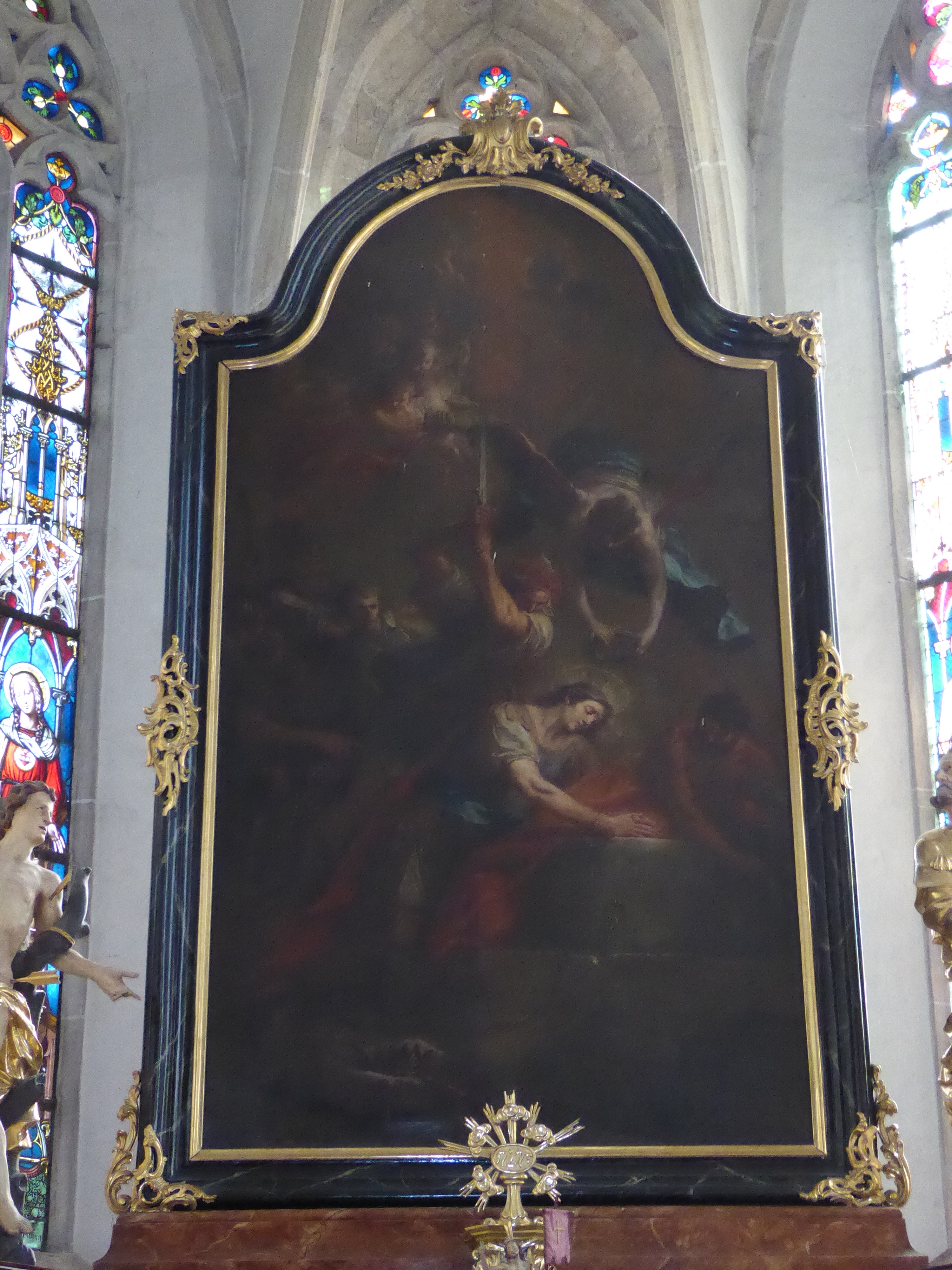 Pfarrkirche in Unterloiben (Dürnstein) in Niederösterreich - Hochaltarbild Martyrium des hl. Quirin (Martin Johann Schmidt, 1782)